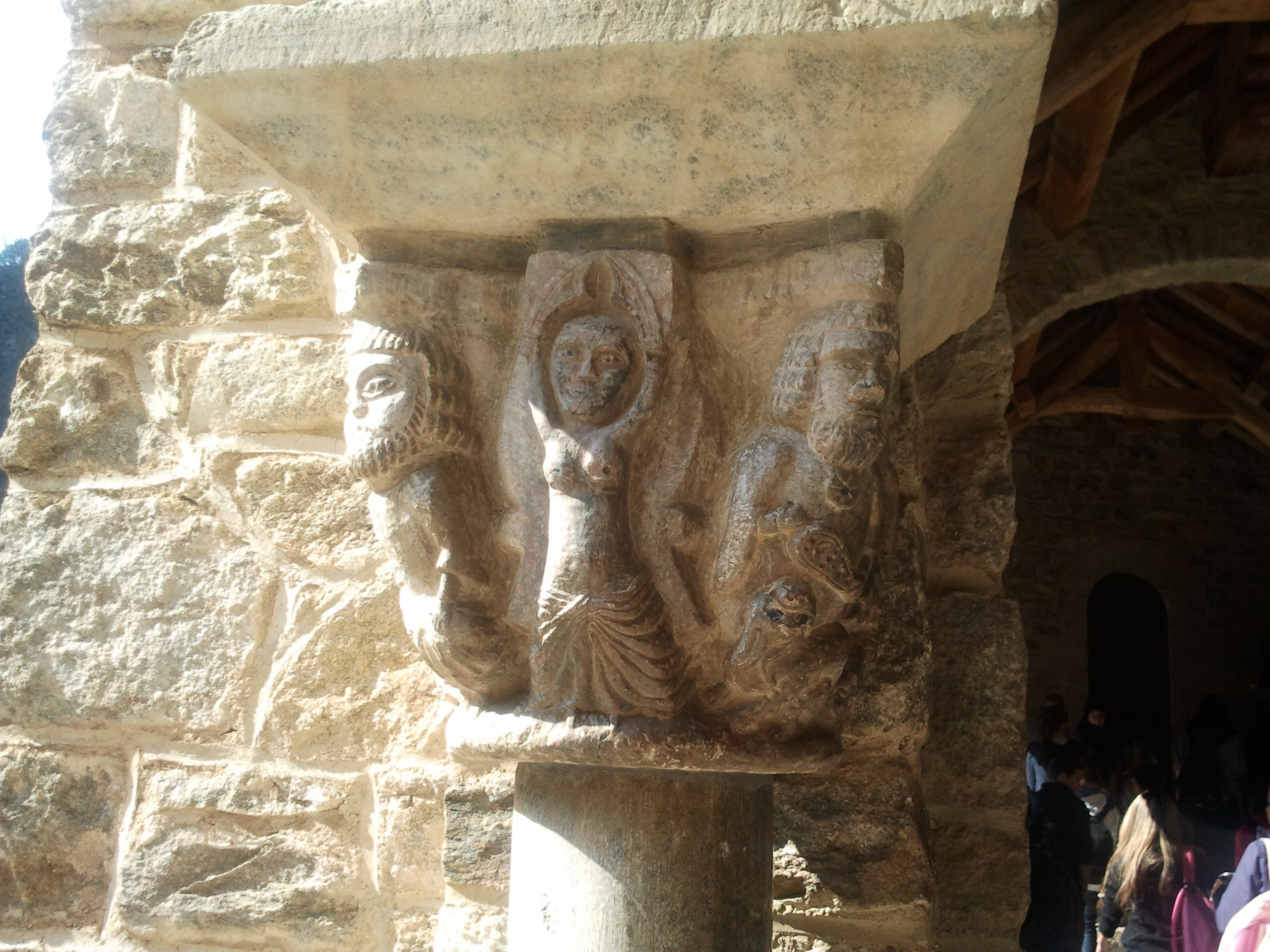 Capitell sobre els pecats capitals que hi ha a Sant Martí del Canigó i que en aquesta cara representa Salomé